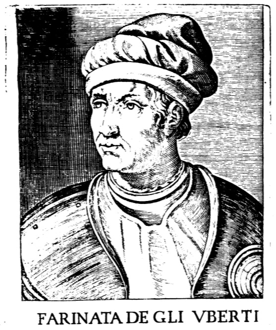 Ritratto del condottiero Farinata degli Uberti